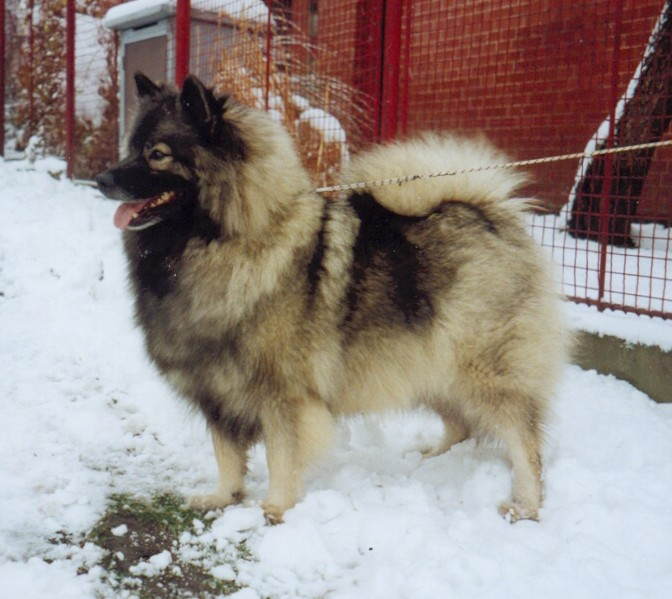 Německý špic vlčí Zuza Punkt Widzenia